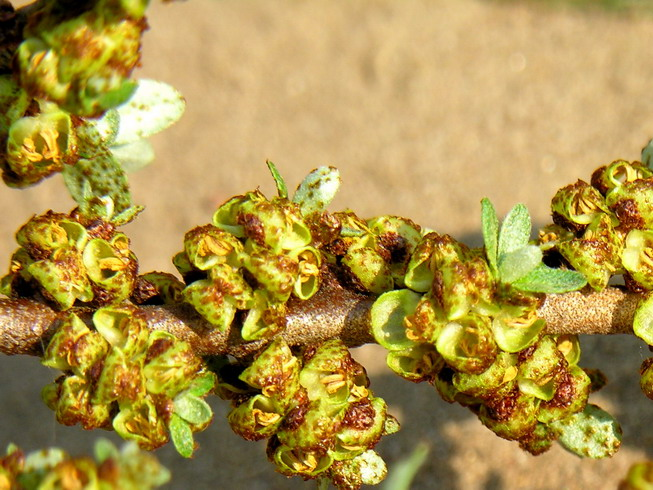 Pražydęs dygliuotasis šaltalankis (Hippophae rhamnoides) Šeima. Žilakrūminiai (Elaeagnaoceae) Foto: User:Algirdas, 2006 m. gegužės 6 d.